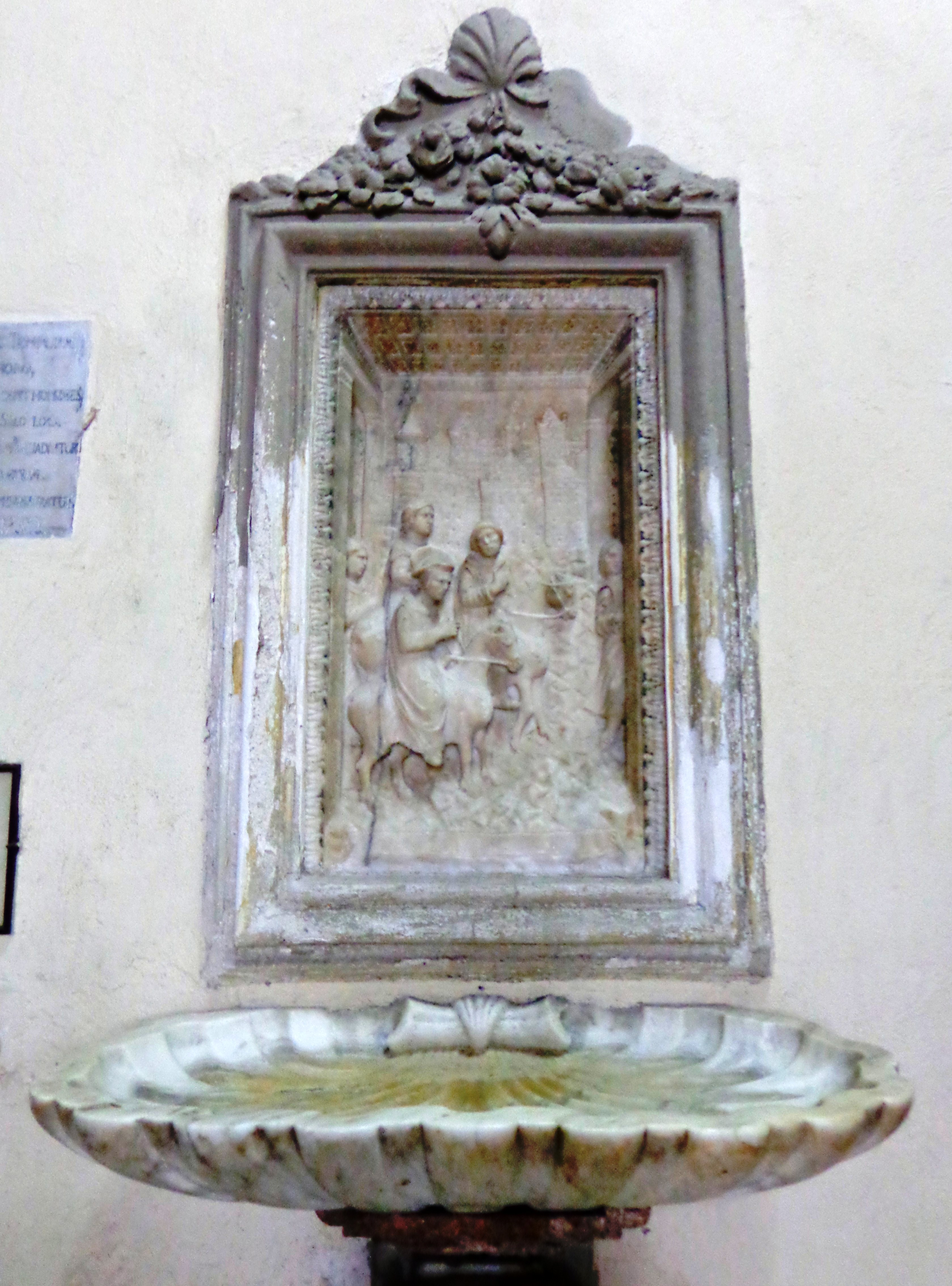 San Domenico PA 02